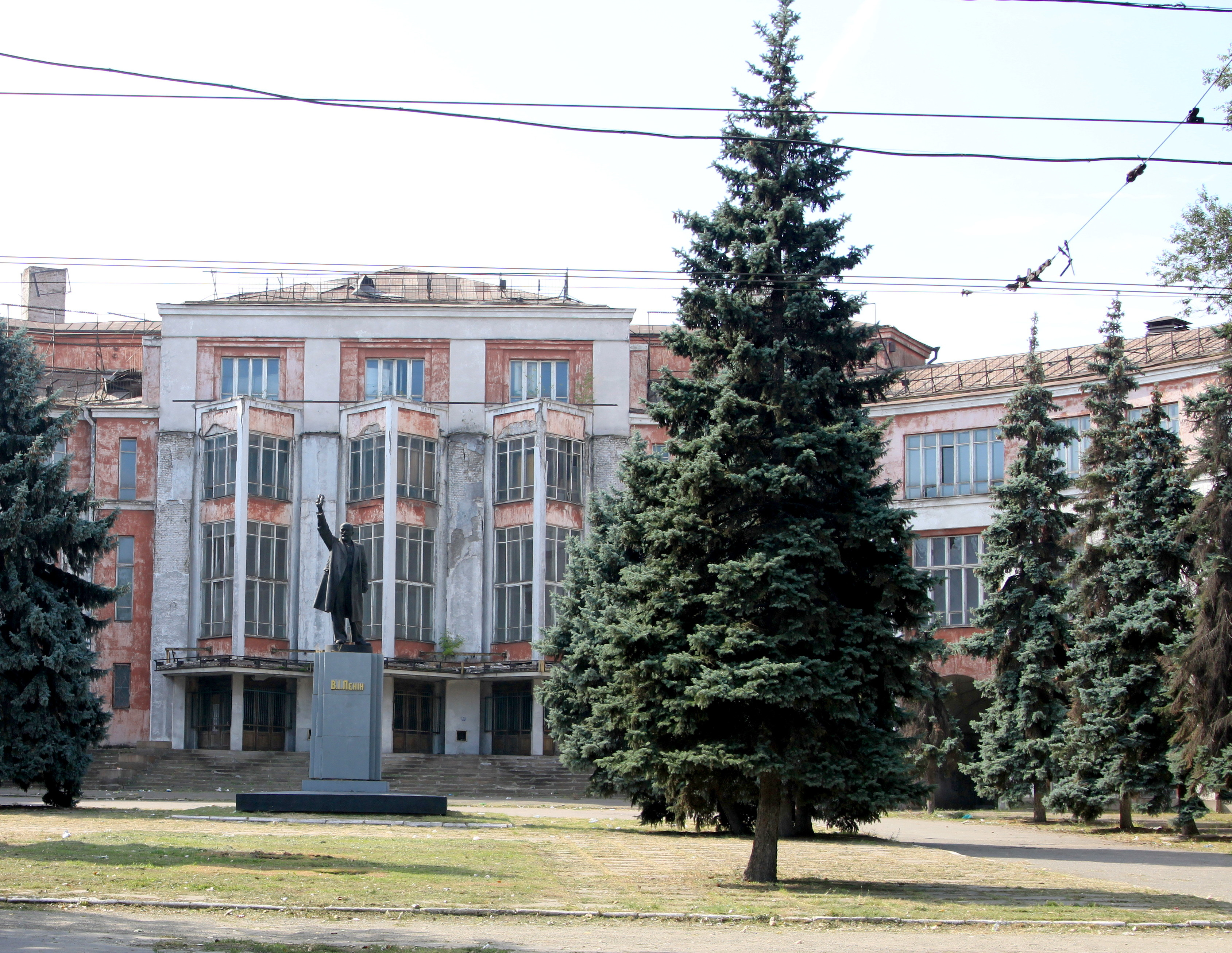 Палац праці (мур.), Дніпропетровськ, просп.Сергія Нігояна, 47